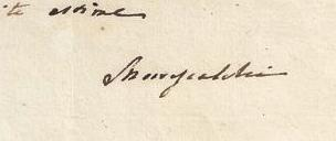 Signature de Ferdinando Marescalchi (1754-1830).